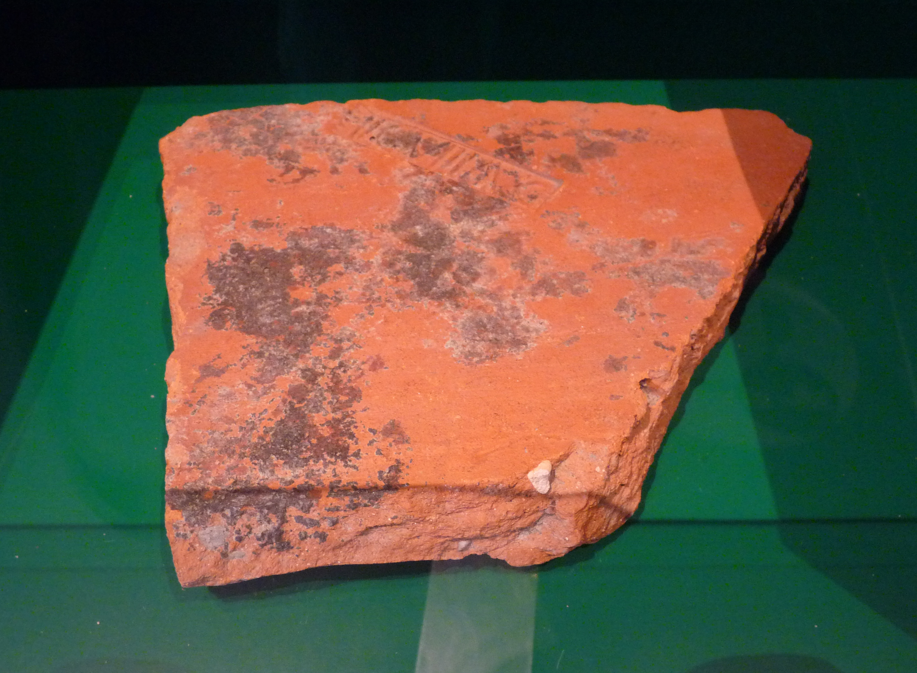 Brique estampillée de la 8e Légion Auguste (2e siècle après JC). Trouvée rue du Dôme, Strasbourg. Céramique (Musée historique de Strasbourg)